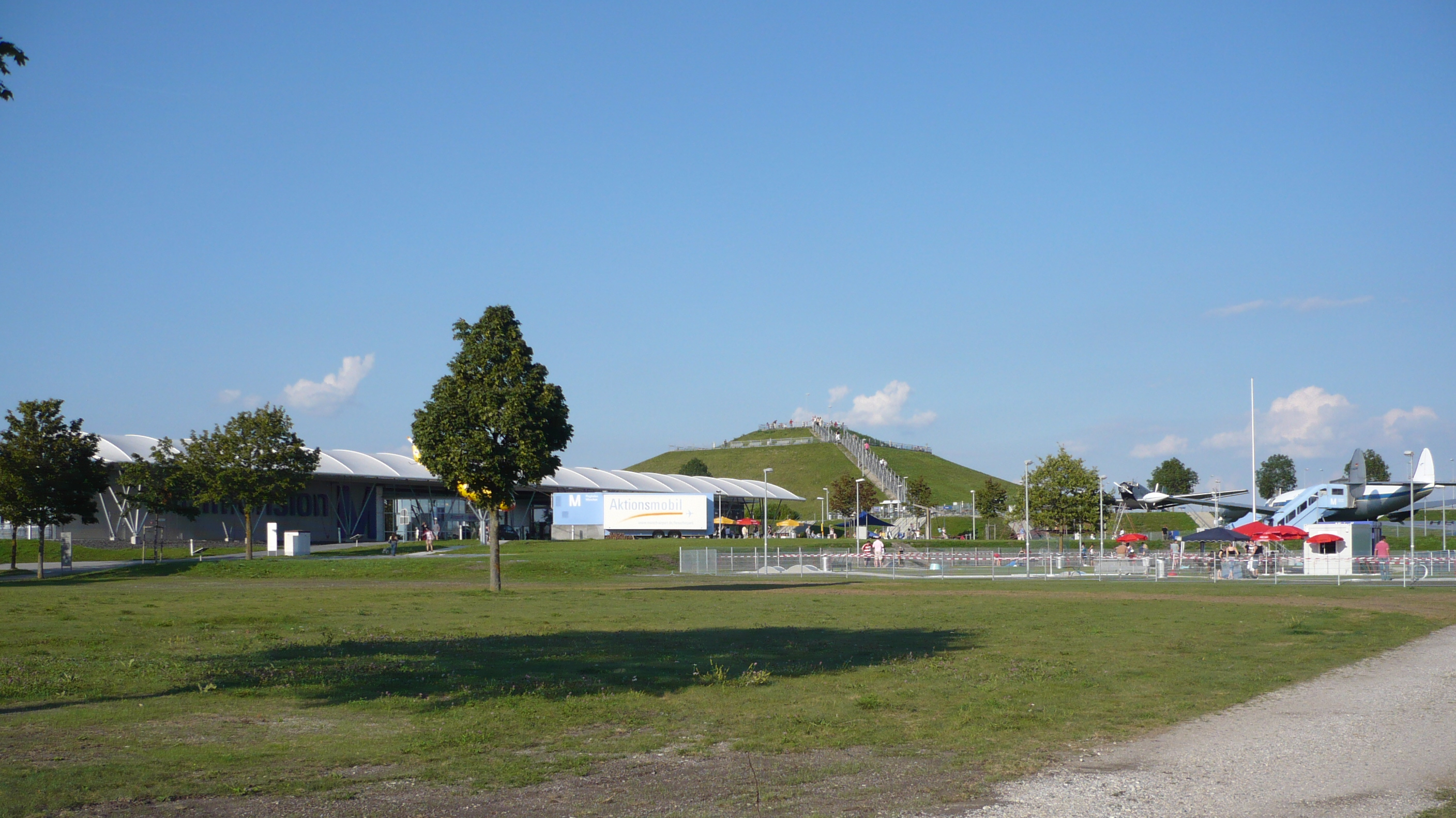 Besucherpark des Flughafen Münchens